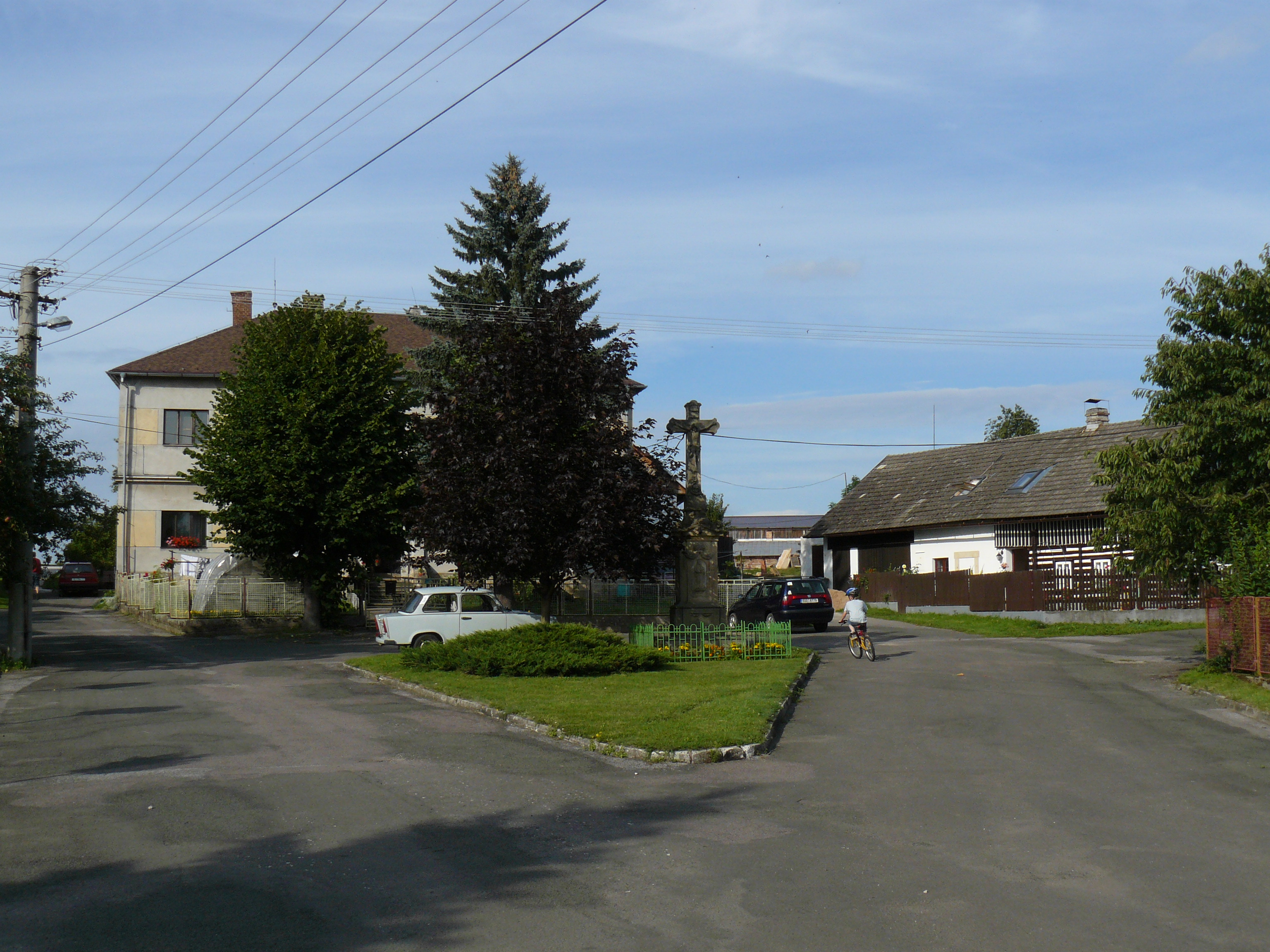 Vřesník